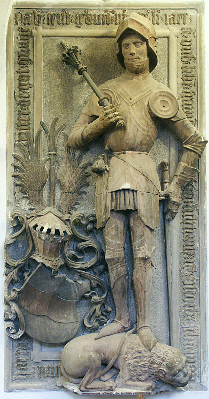 Epithaph (Grabbildnis, Grabstele) des Ritters Hermann von Harras in der Thomaskirche zu Leipzig